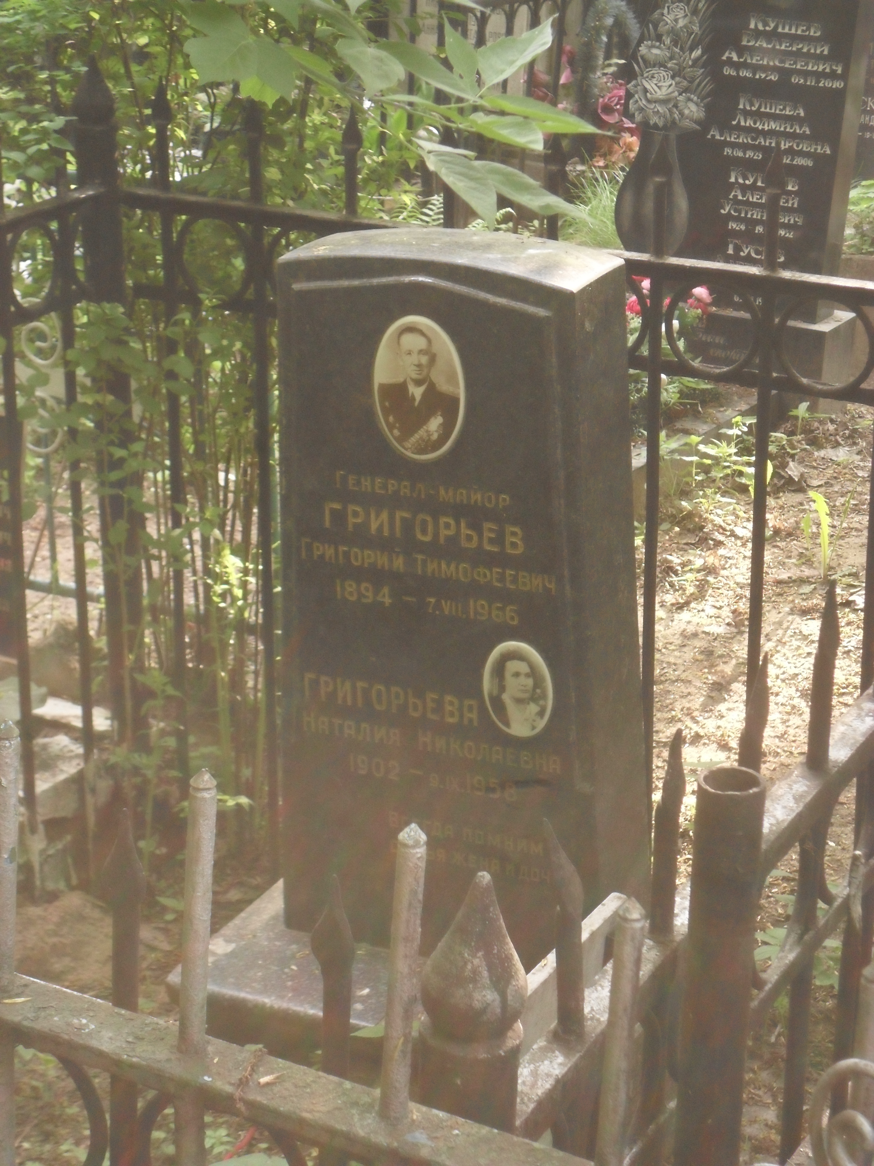 Могила генерал-майора Григория Григорьева на Ваганьковском кладбище Москвы.